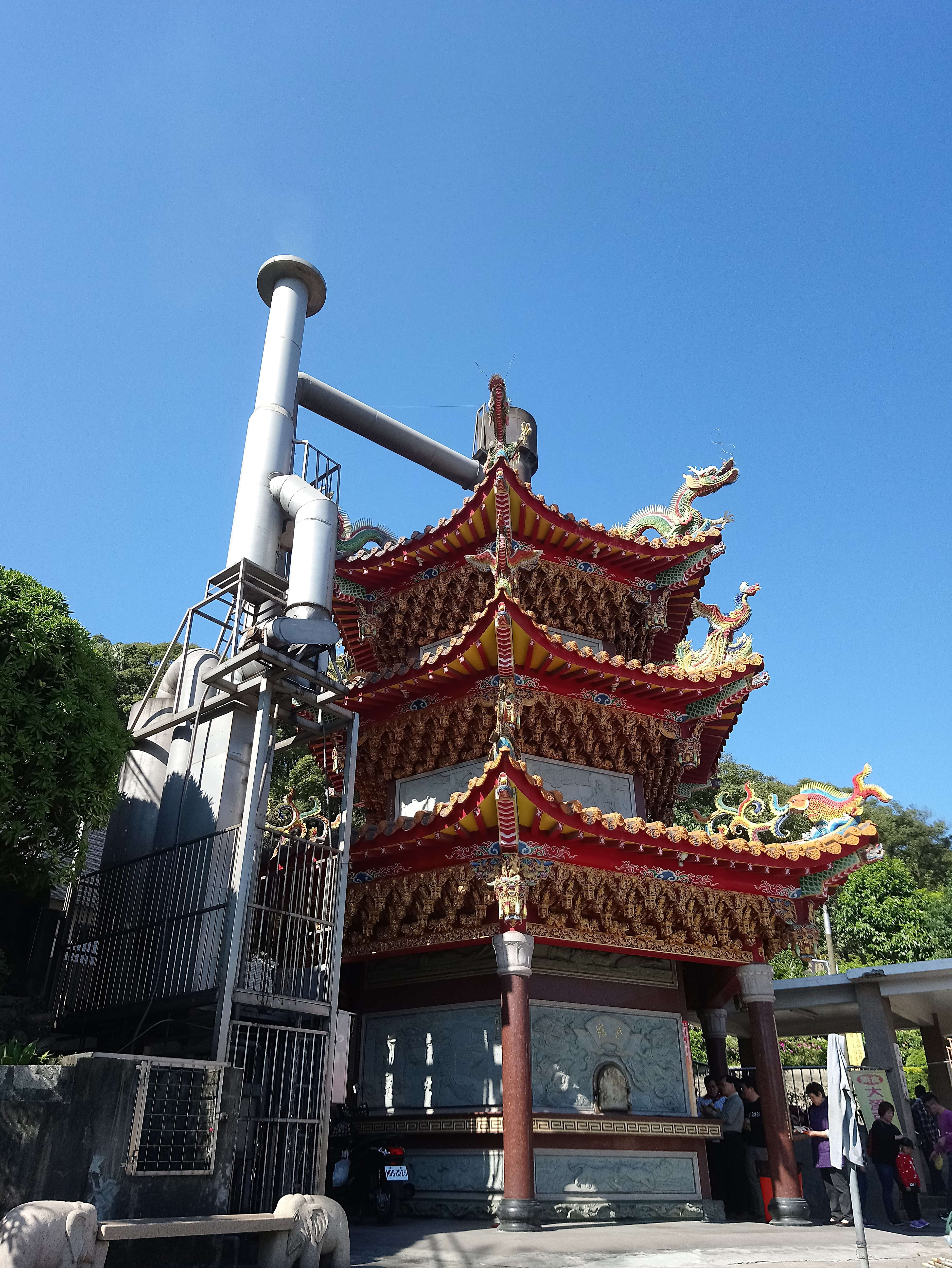 壽山巖觀音寺金爐,桃園市龜山區嶺頂里